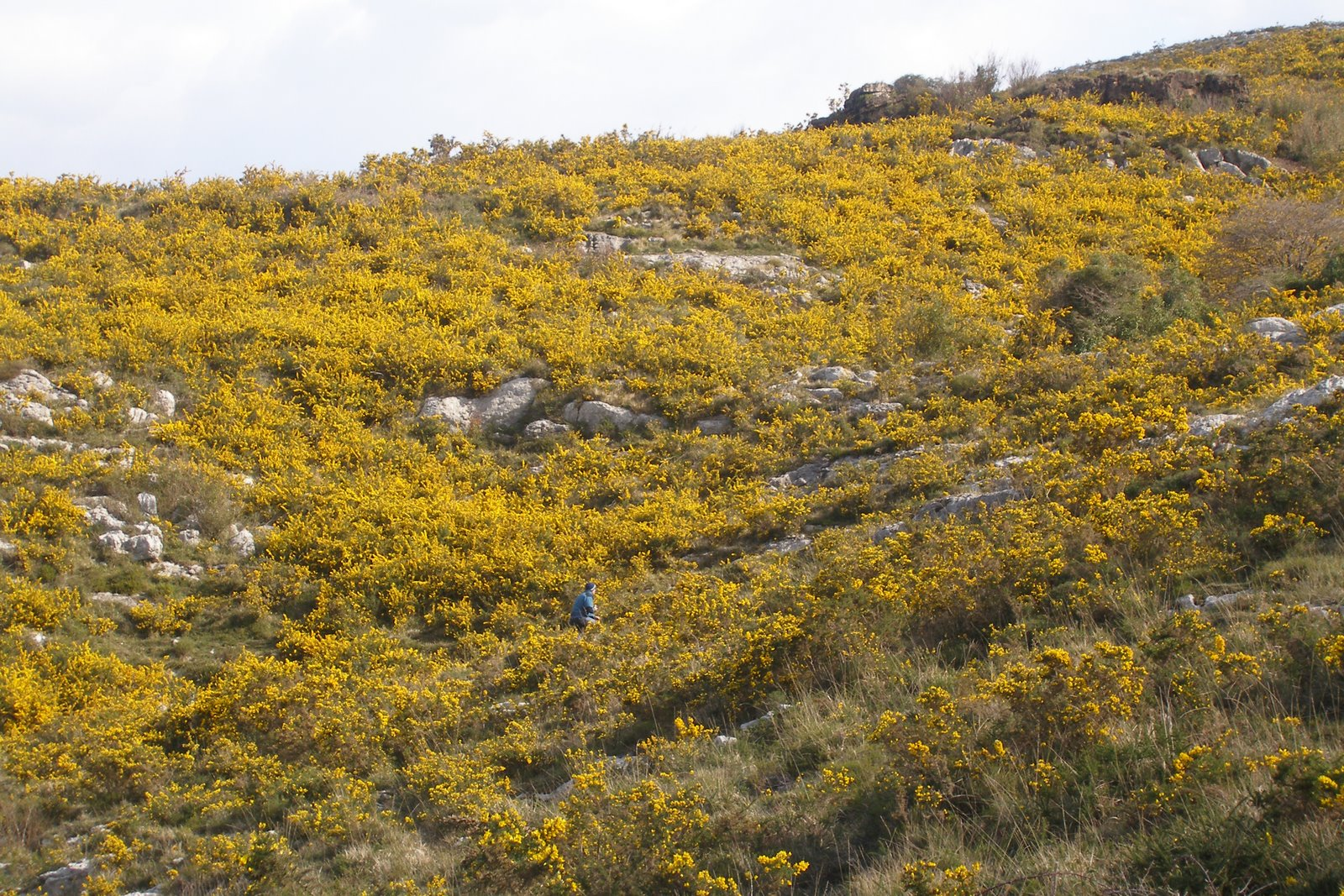 Brezal en Luna Llena - Rescaño (Sel del Haya). Cantabria, España.